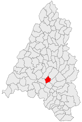 Categorie:Hărţi ale judeţului Bihor